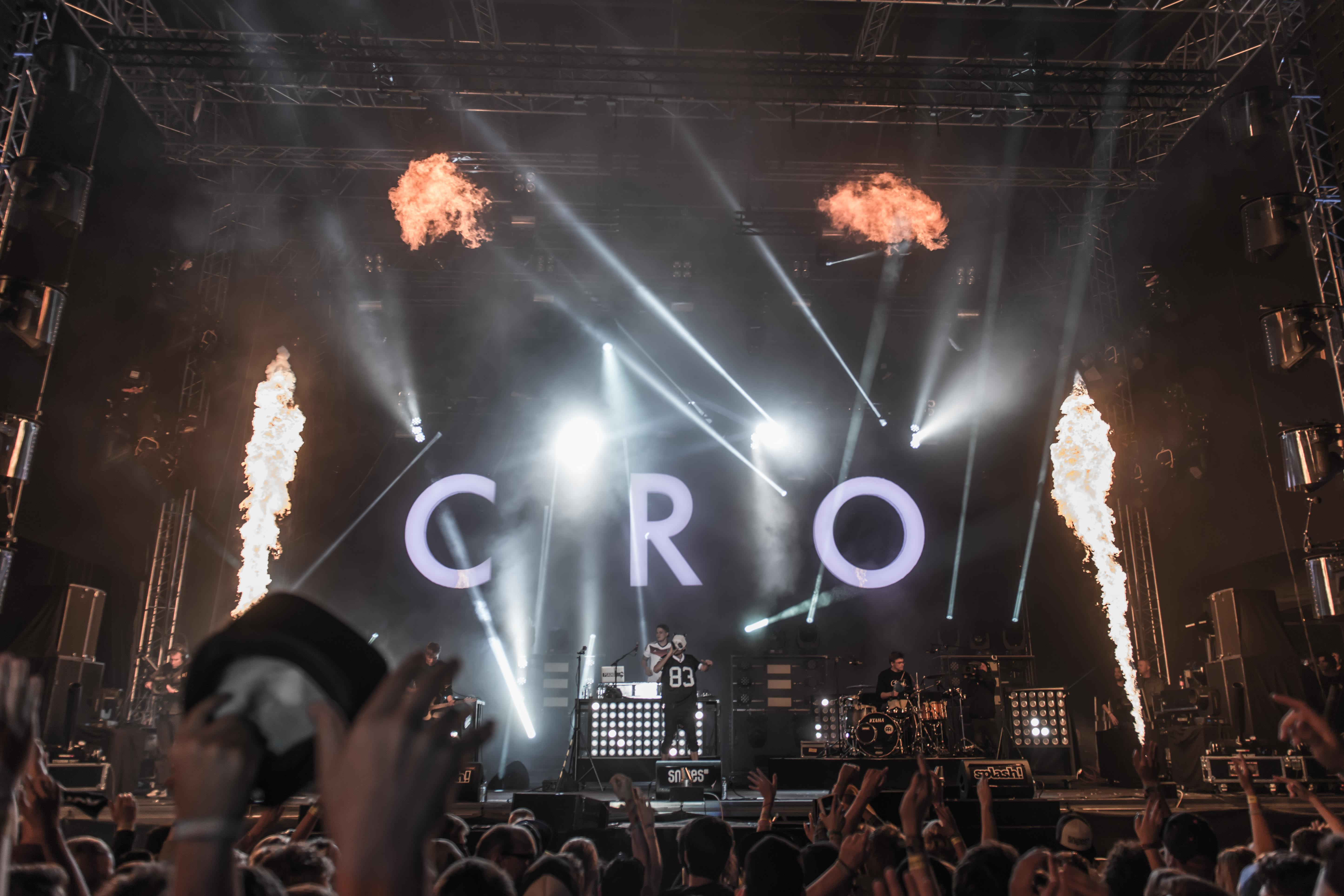 Cro auf der Vulcano Stage des Splash! Festival 2014